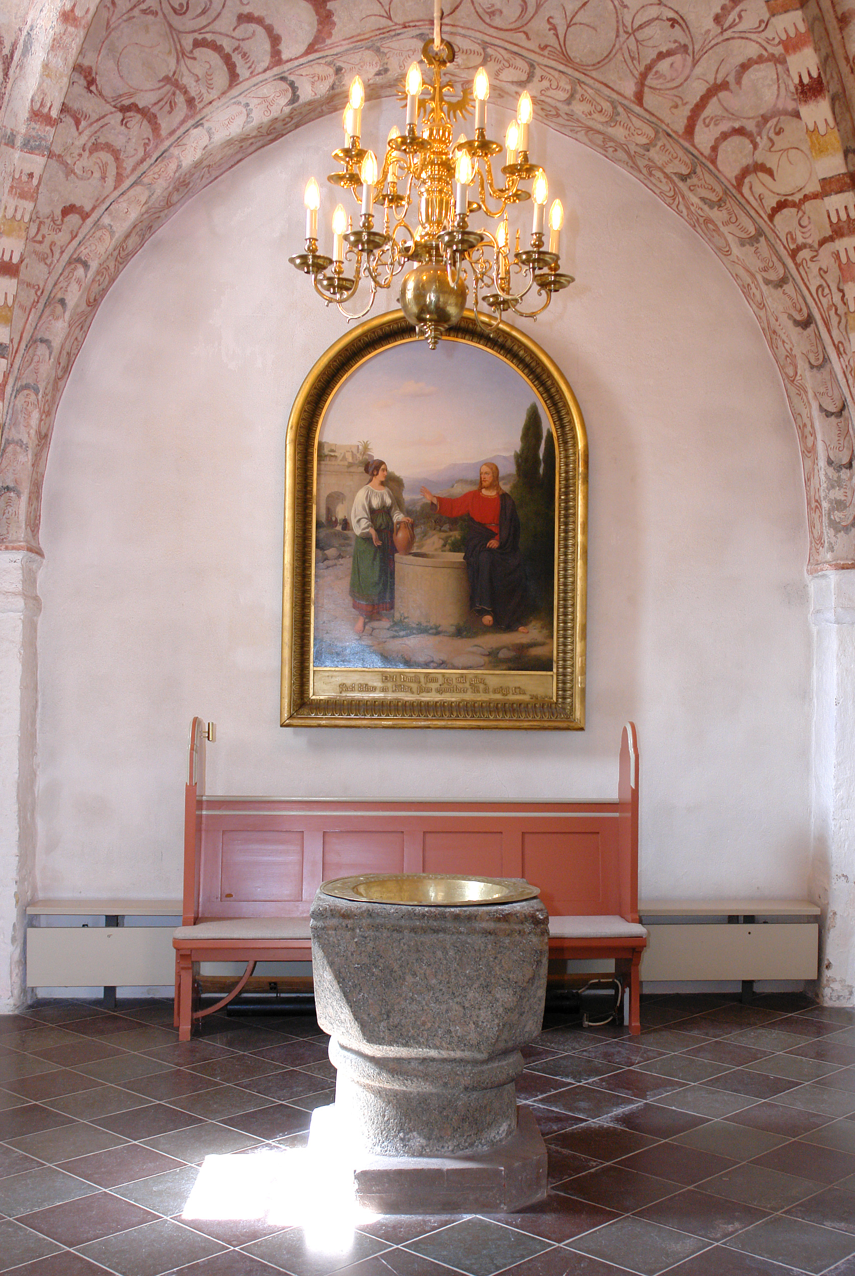 Kirche von Nødebo, Dänemark (Nord-Seeland). Taufstein aus romanischer Zeit.